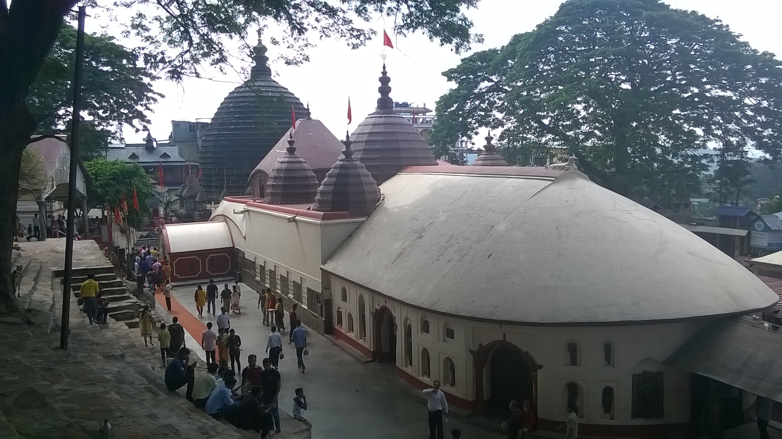 অসমীয়া: কামাখ্যা মন্দিৰৰ এক দৃশ্য।